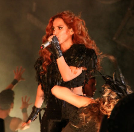 A cantora brasileira Wanessa em apresentação da turnê DNA, em 16 maio de 2013.